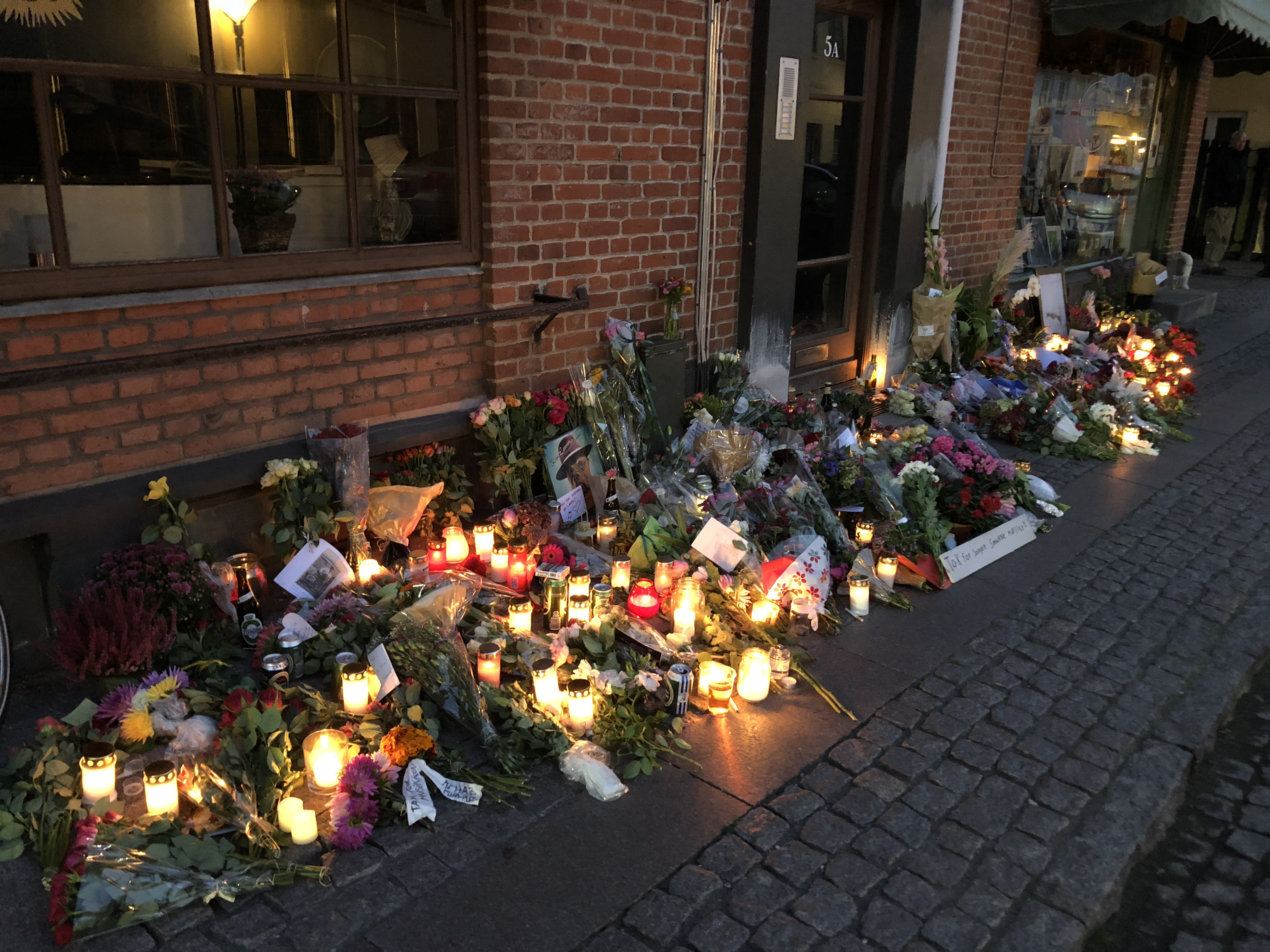 Billede af blomster ved Kim Larsens hjem, udfor Lørups Vinstue